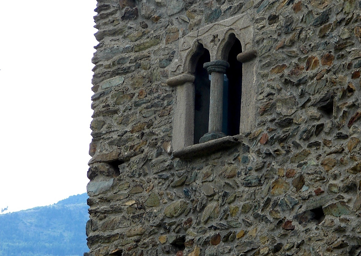 Château d'Ussel - Vallée d'Aoste - Italie Détail d'encadrement de fenêtre sur la façade ouest de l'édifice.